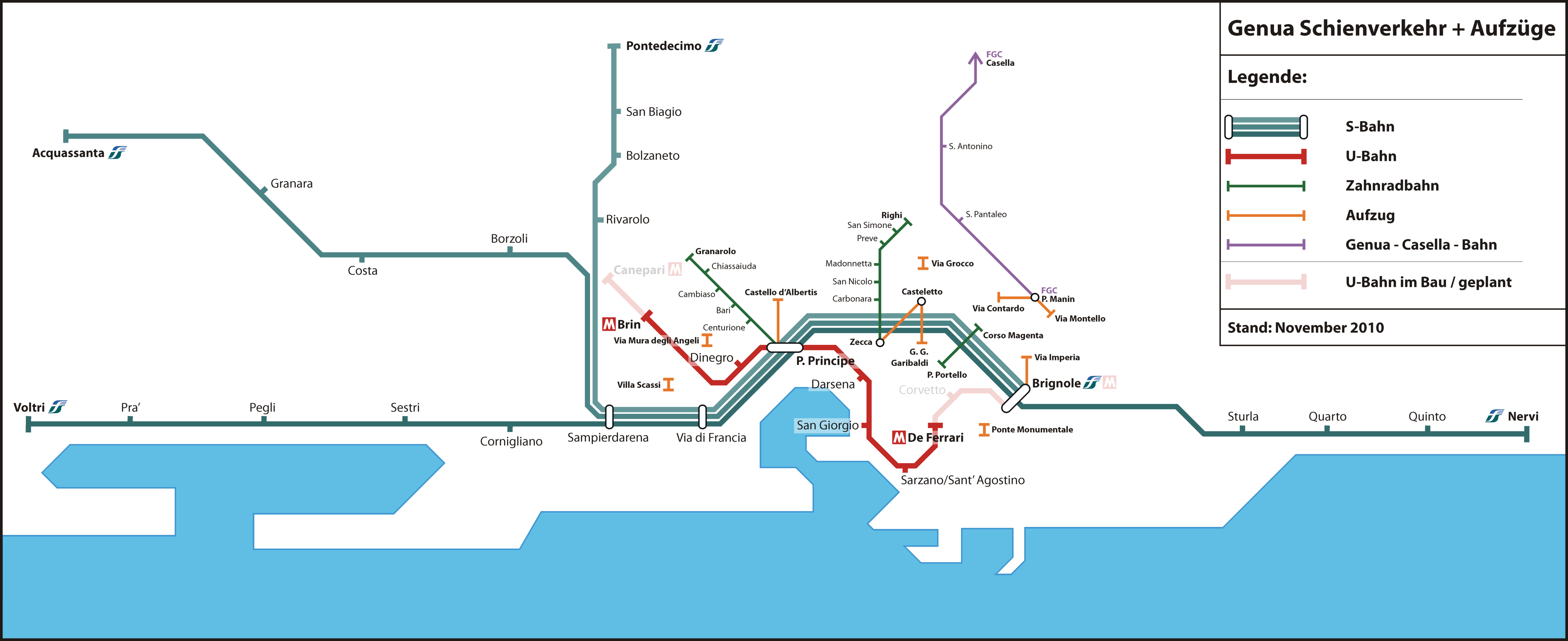 Netzplan Genuas mit Schienenverkehr und Aufzügen